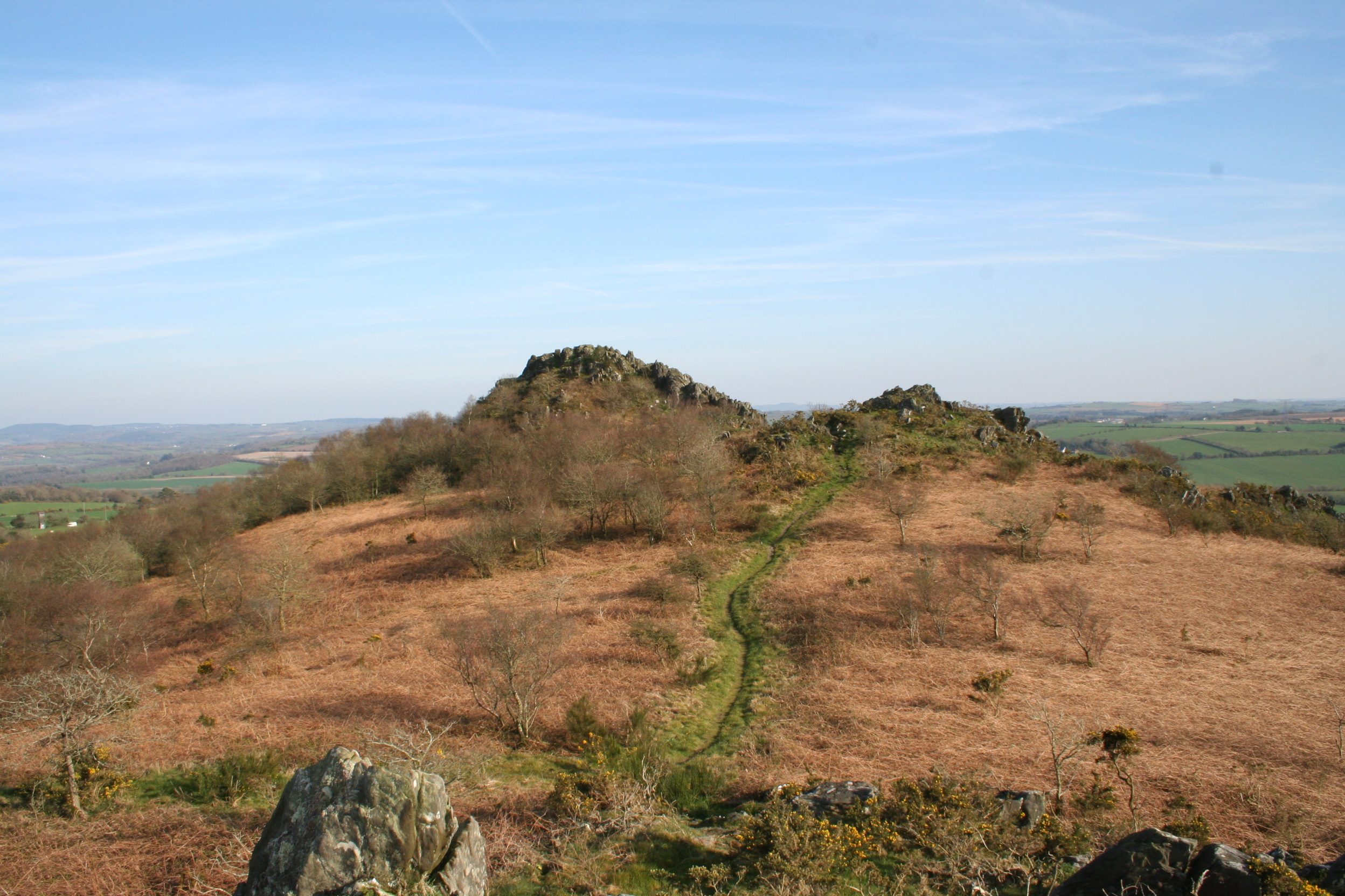 La Roche du Feu à GouézecBrezhoneg: Karreg an Tan, e Gouezeg